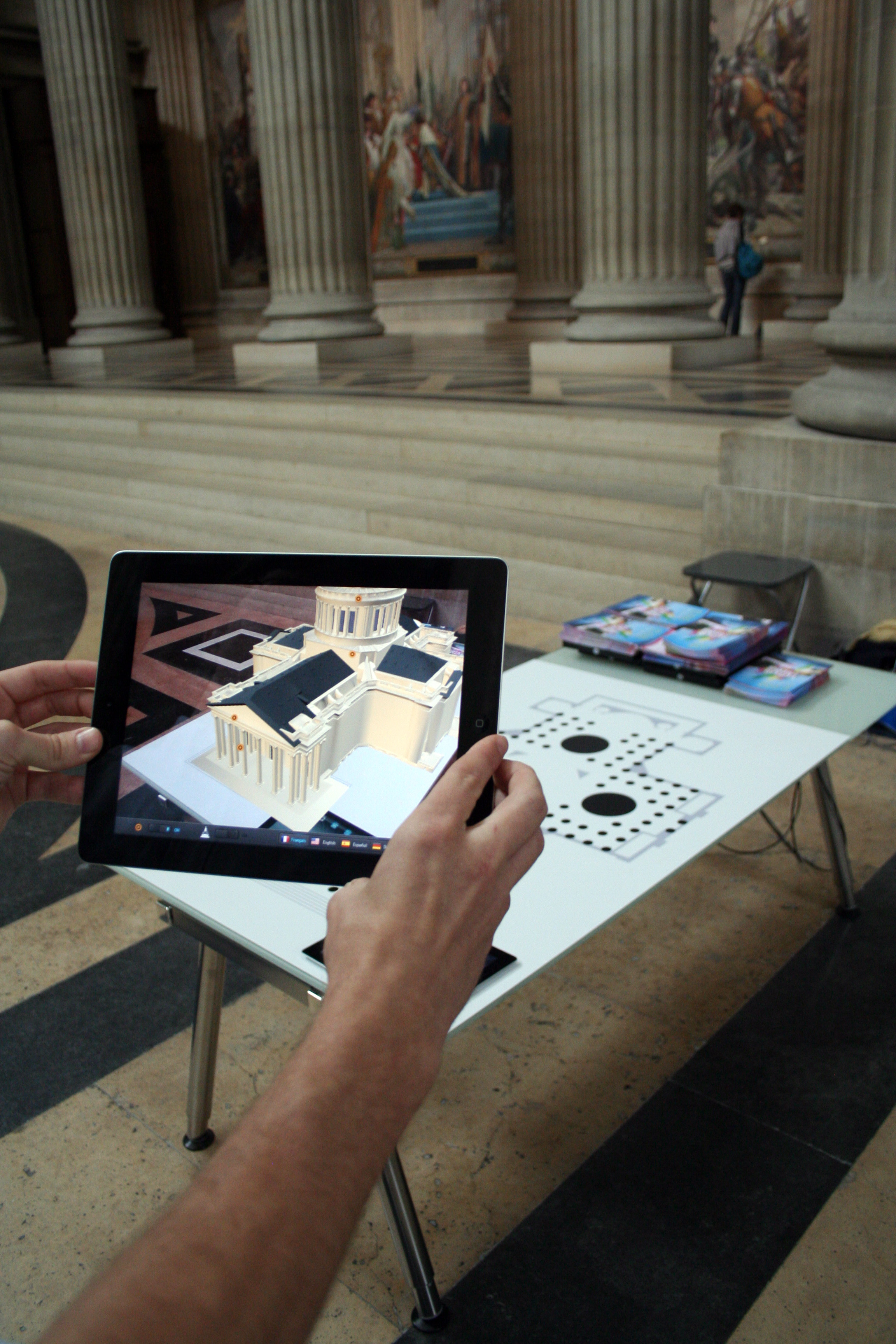 Et voilà le résultat via un iPad Futur en Seine 2011.